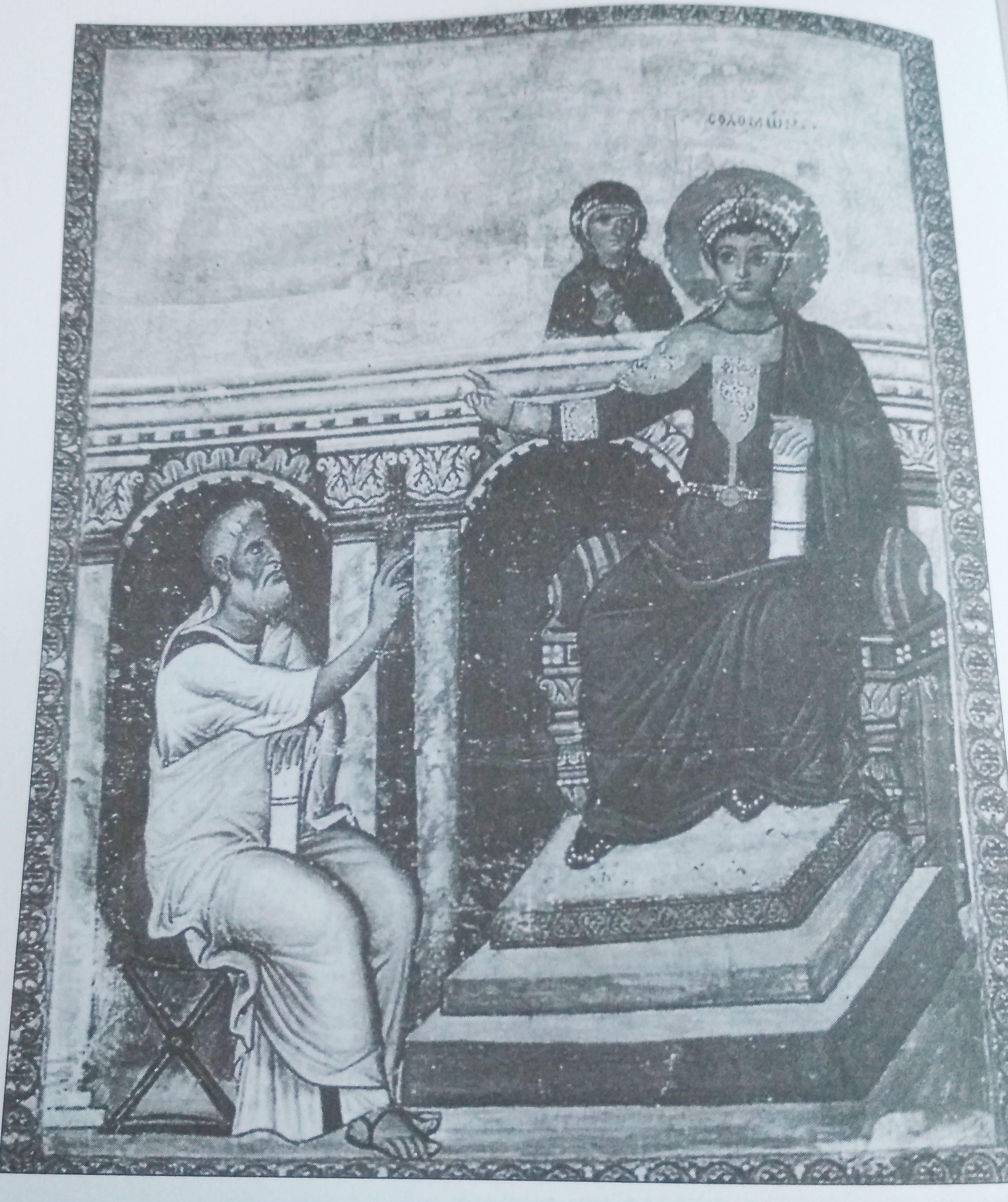 Ο βασιλιάς Σολομώντας μιλά με τον Σειράχ και στο βάθος η Σοφία προσωποποιημένη.